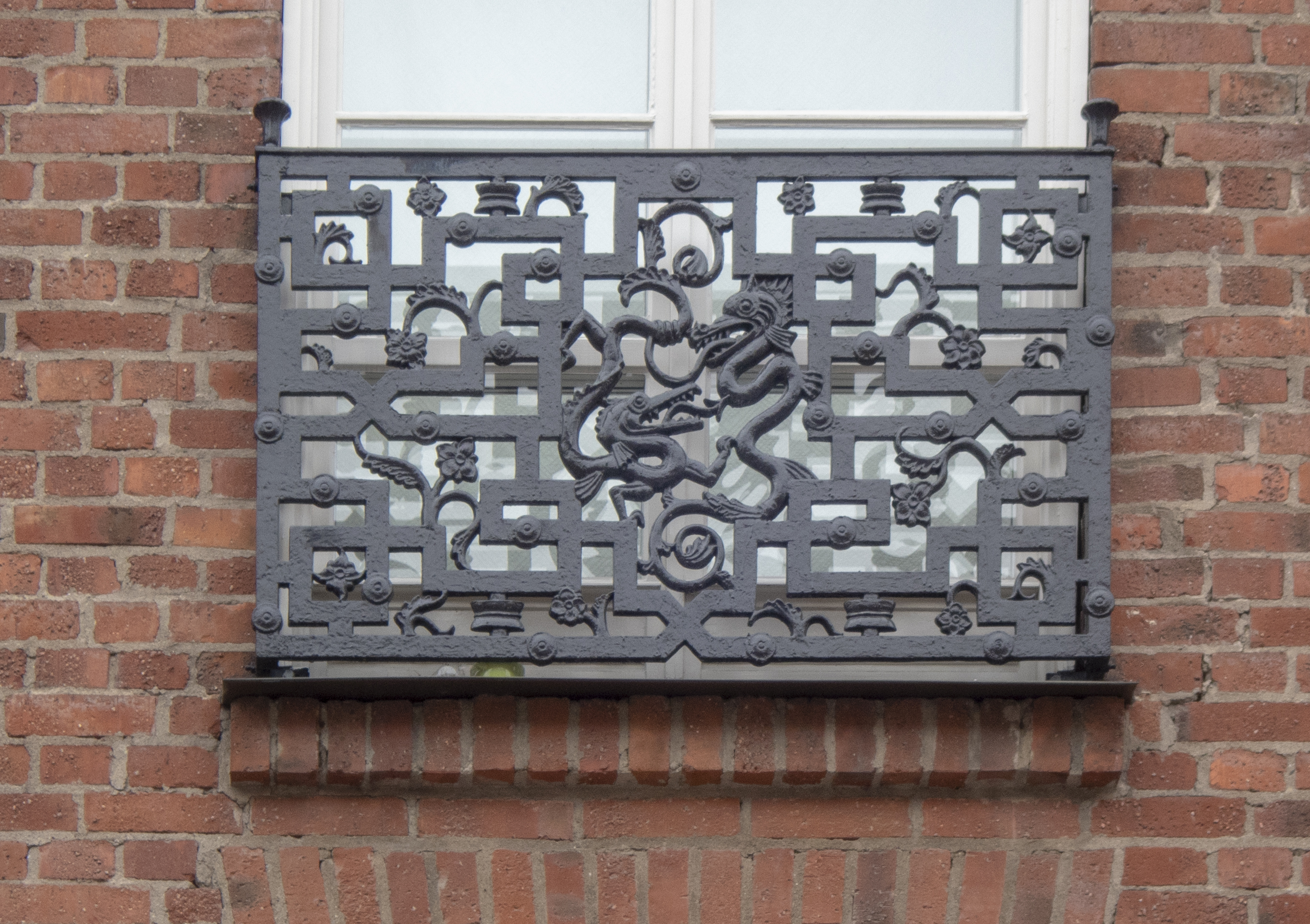 Balkongräcke från Näfveqvarns bruk formgivet av Harald Wadsjö 1925. Detta sittande på Hantverkargatan 56 i Stockholm. Finns även på flera hus vid Jakob Westinsgatan